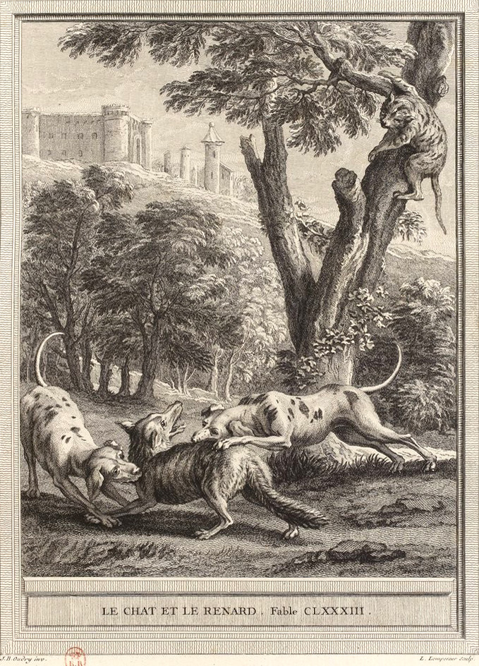 Gravure réalisée par Louis Simon Lempereur d'après un dessin de Jean-Baptiste Oudry représentant la fable Le chat et le renard de Jean de La Fontaine (fable 14 du livre IX). Cette gravure est parue dans l'édition complète des fables de La Fontaine, parue en quatre tomes chez l'éditeur Desaint & Saillant, rue saint Jean de Beauvais à Paris, 1755-1759.